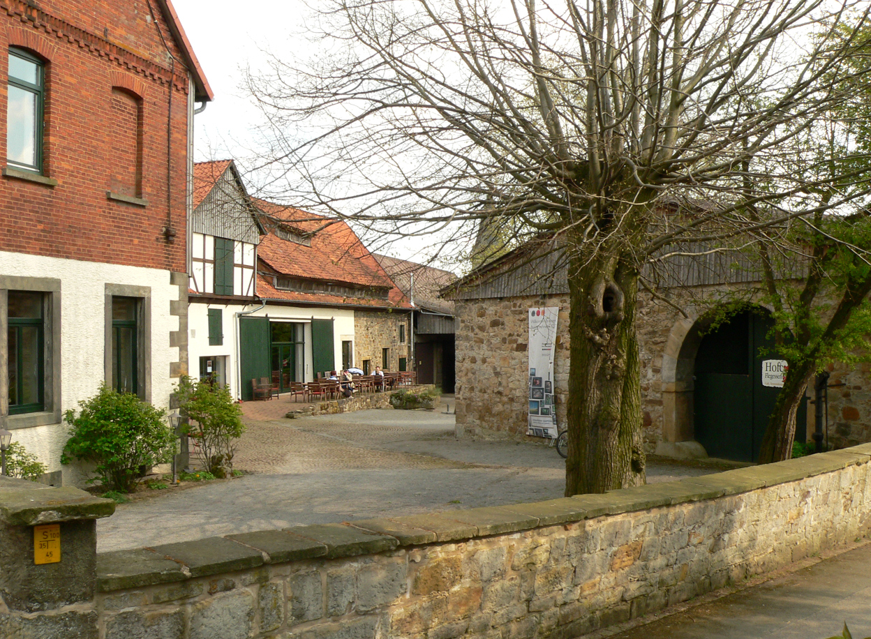 Hof von Gut Flegessen